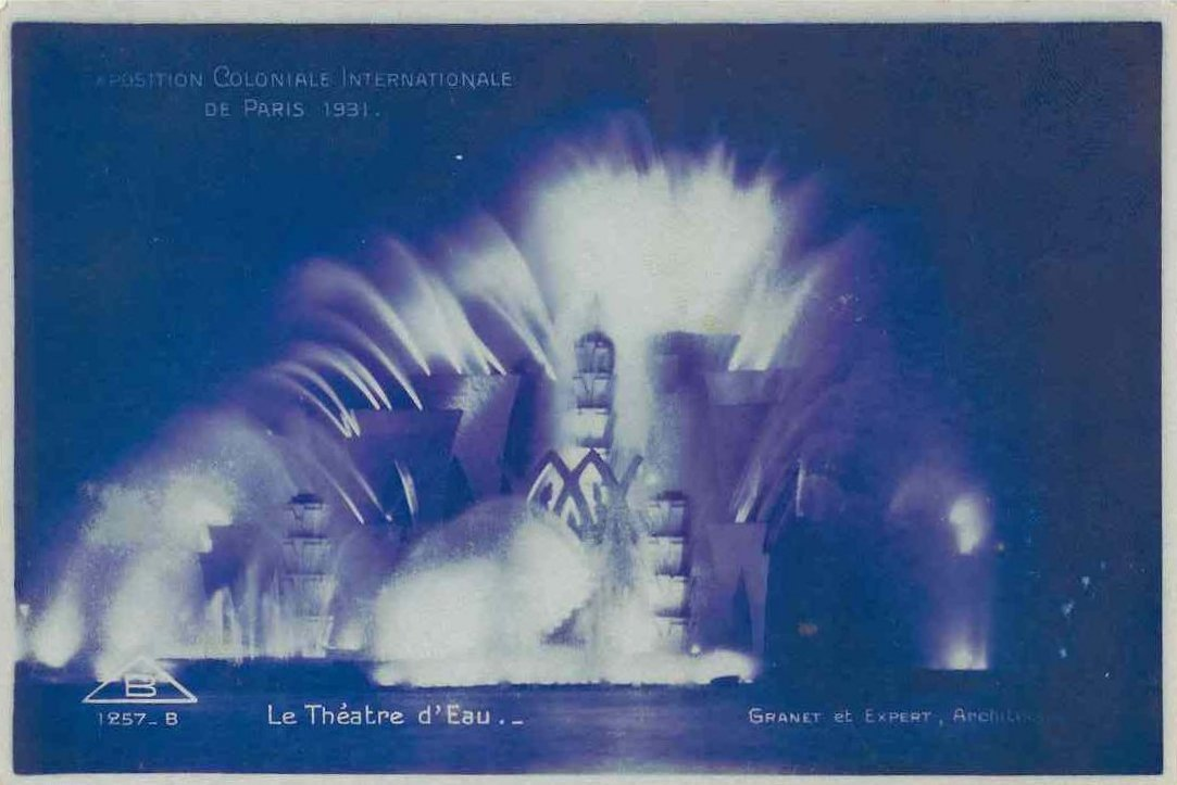 La fontaine monumentale "Le Théatre d'Eau" à l'Exposition Coloniale de Paris en 1931